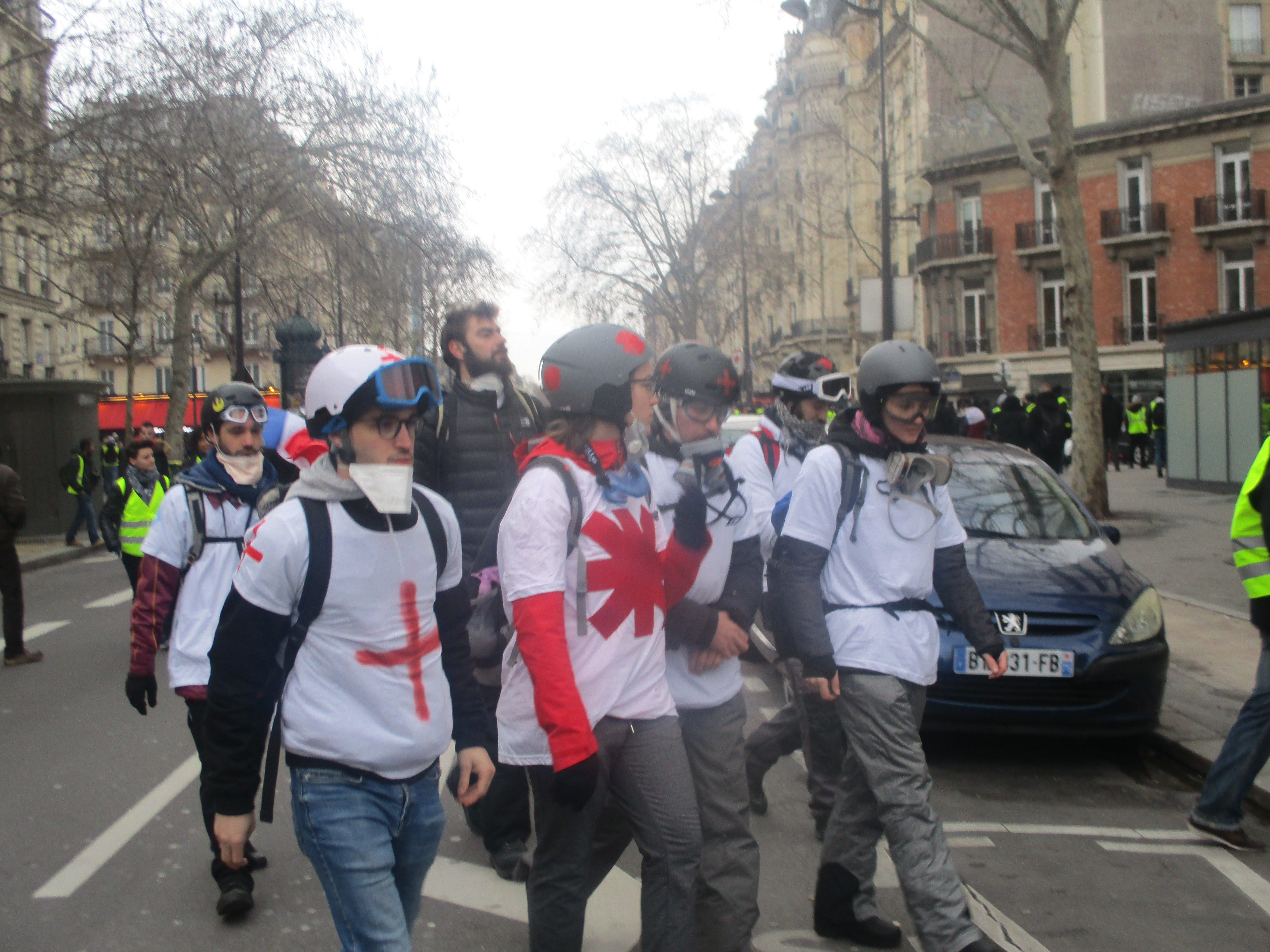 Street medics avenue Daumesnil à Paris pendant la manifestation des gilets jaunes du 2 février 2019.